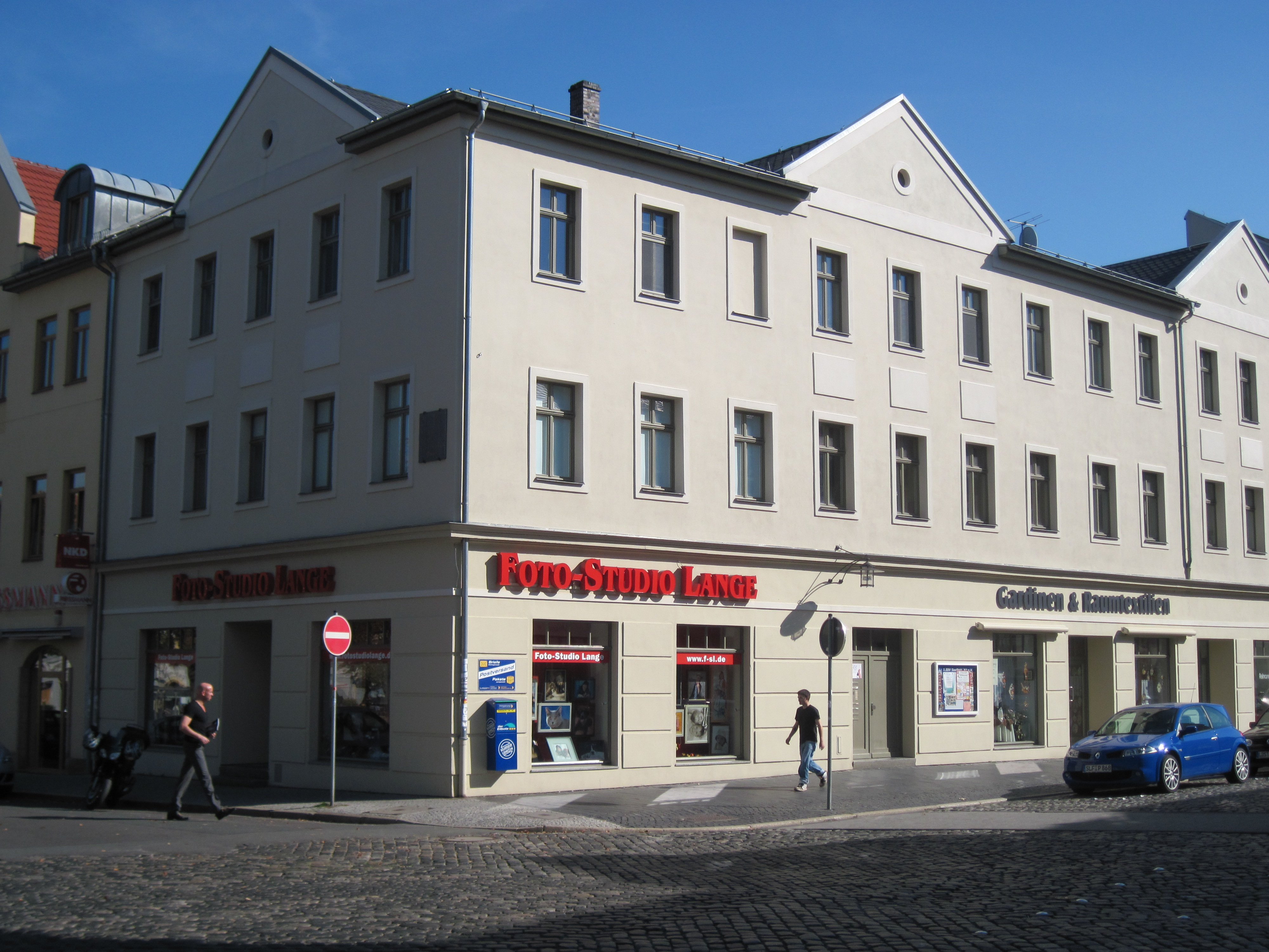 Das Haus, in dem Prinz Louis Ferdinand von Preußen vor dem Gefecht von Saalfeld sich aufhielt.